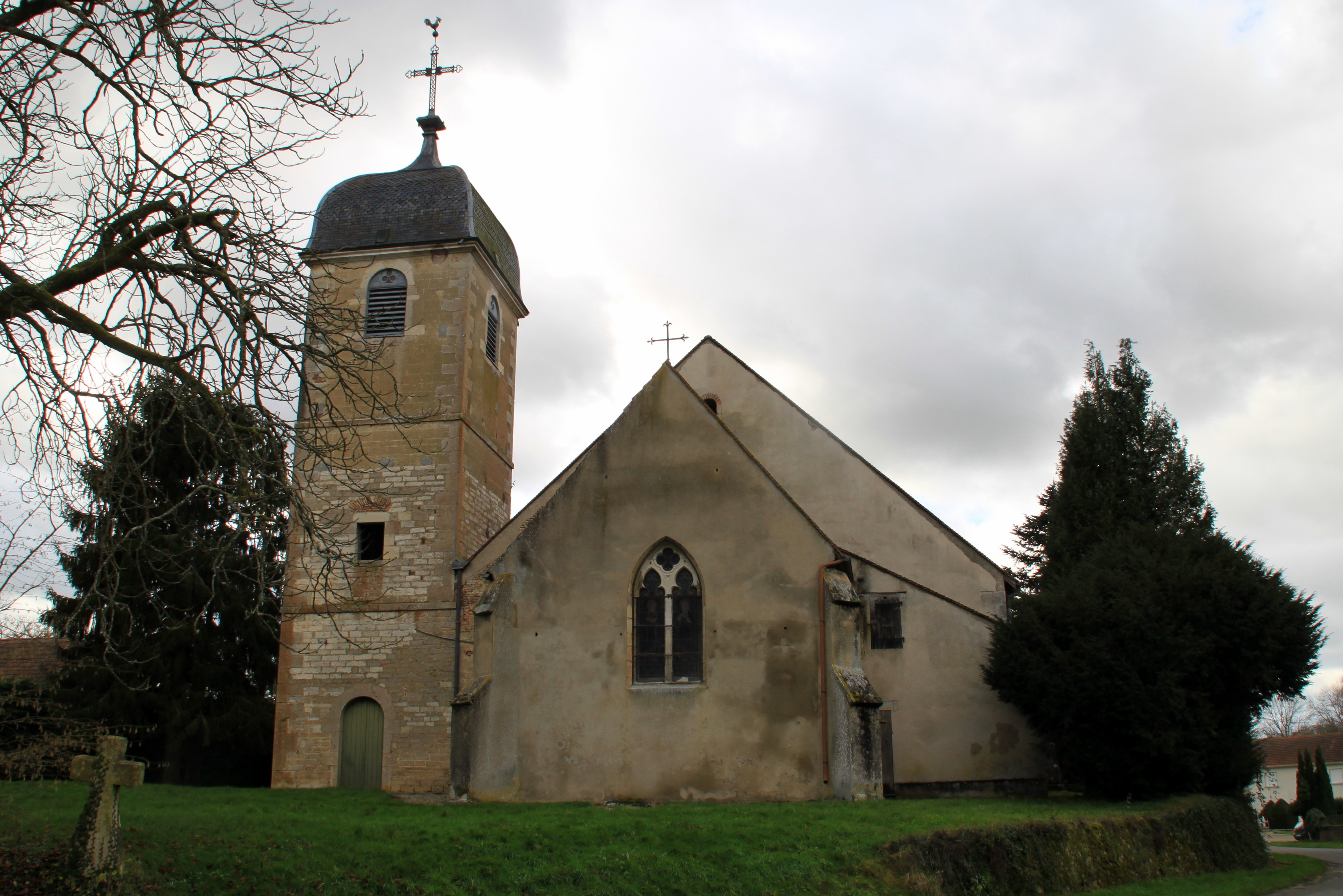 La Chapelle-Saint-Sauveur (Saône-et-Loire) Kirche